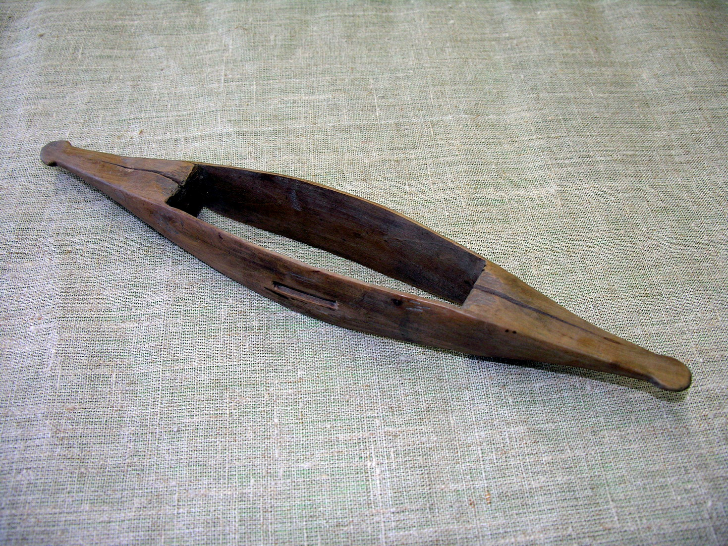 Šaudyklė 2008 m. kovo 4 d., Lietuva